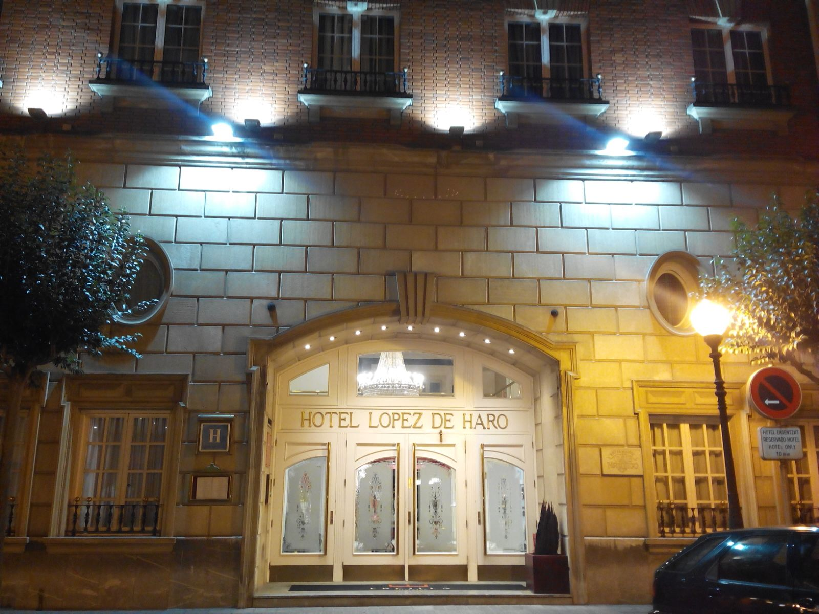 Hotel López de Haro en Bilbao.